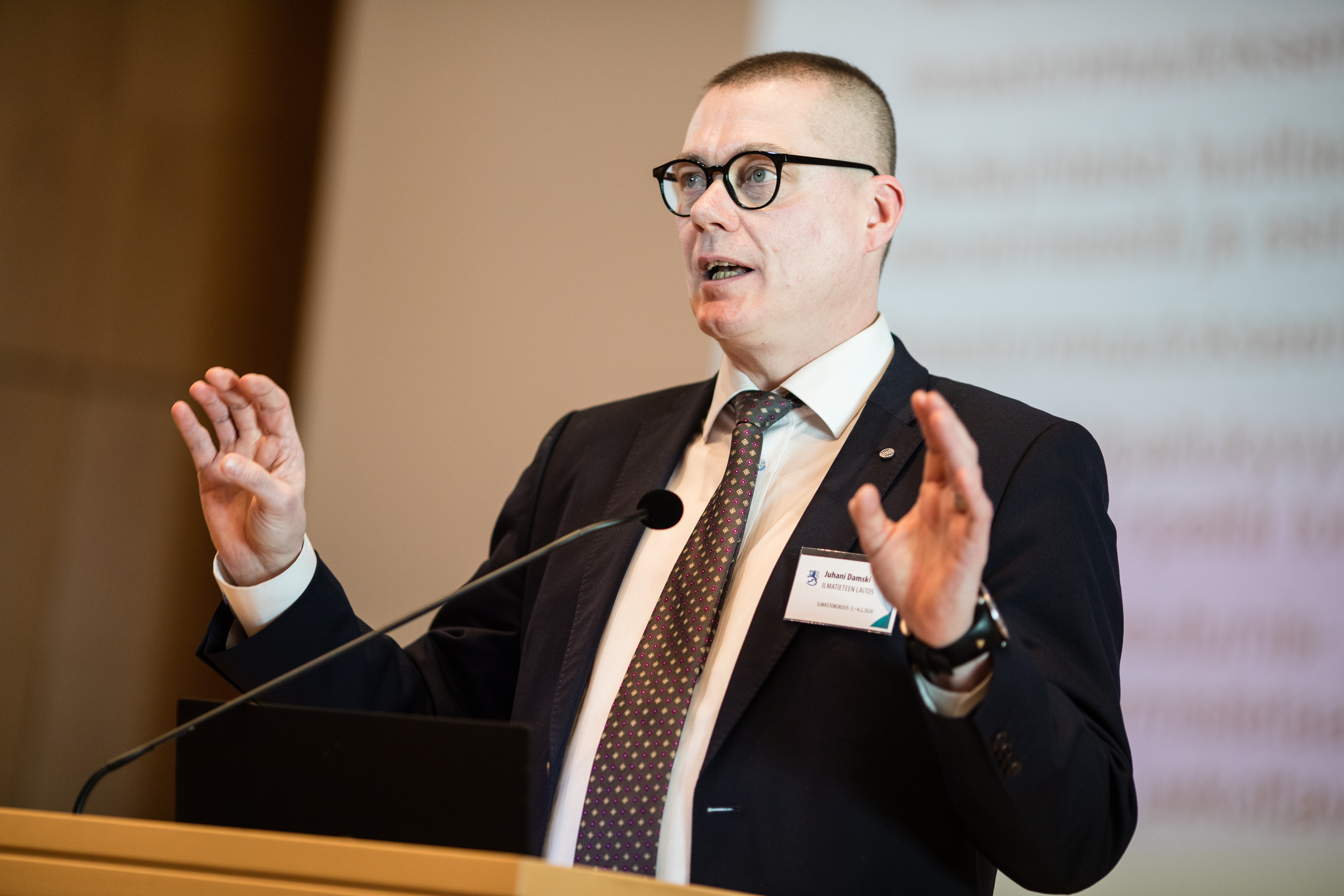 Alustuspuheenvuoro: Juhani Damski, Ilmatieteenlaitos Hallitus ja hallituspuolueiden eduskuntaryhmät kokoontuivat yhteiseen ilmastokokoukseen Helsingin Vuosaareen. © Laura Kotila | valtioneuvoston kanslia